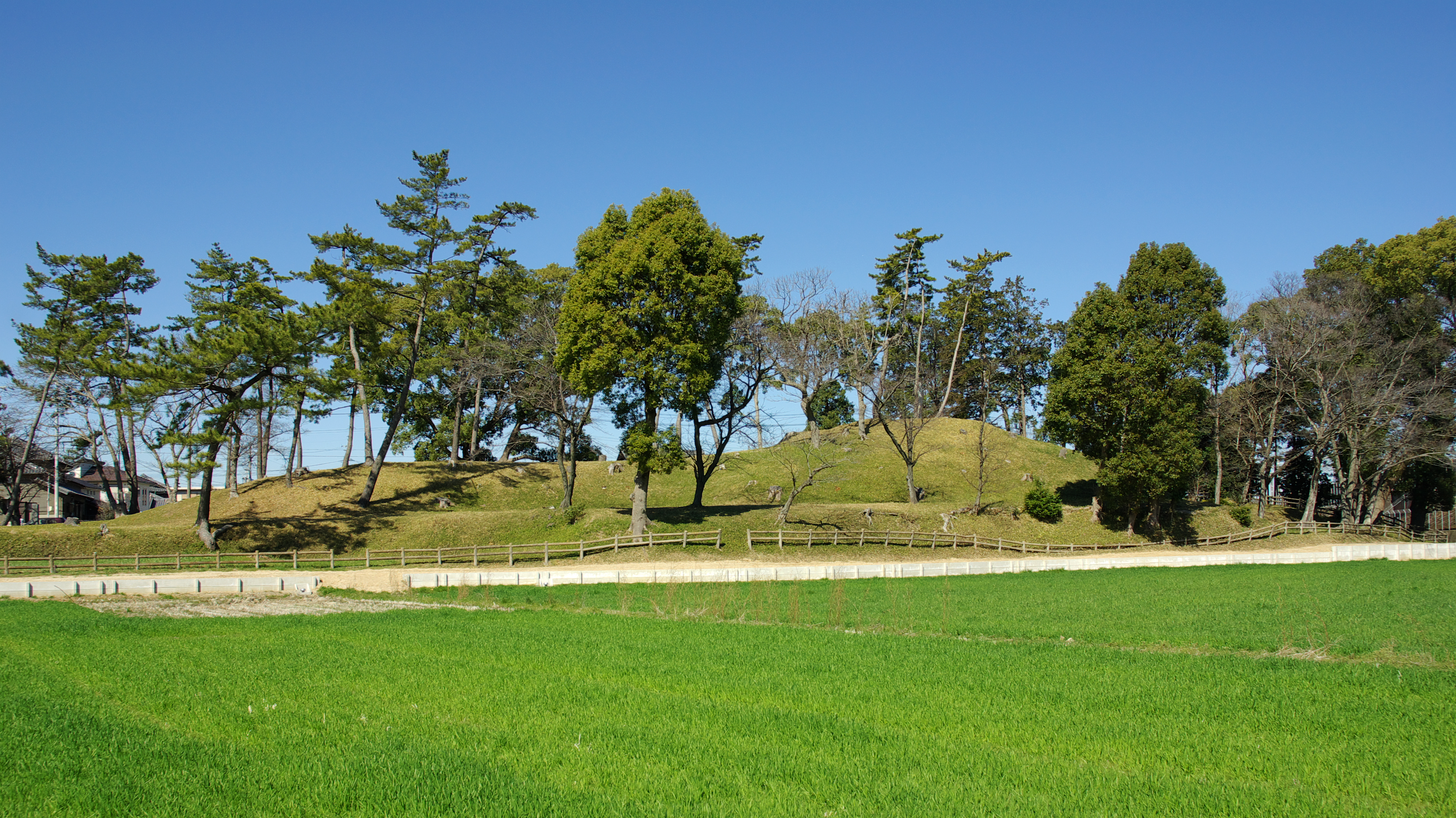 二子古墳全体図、南側より。